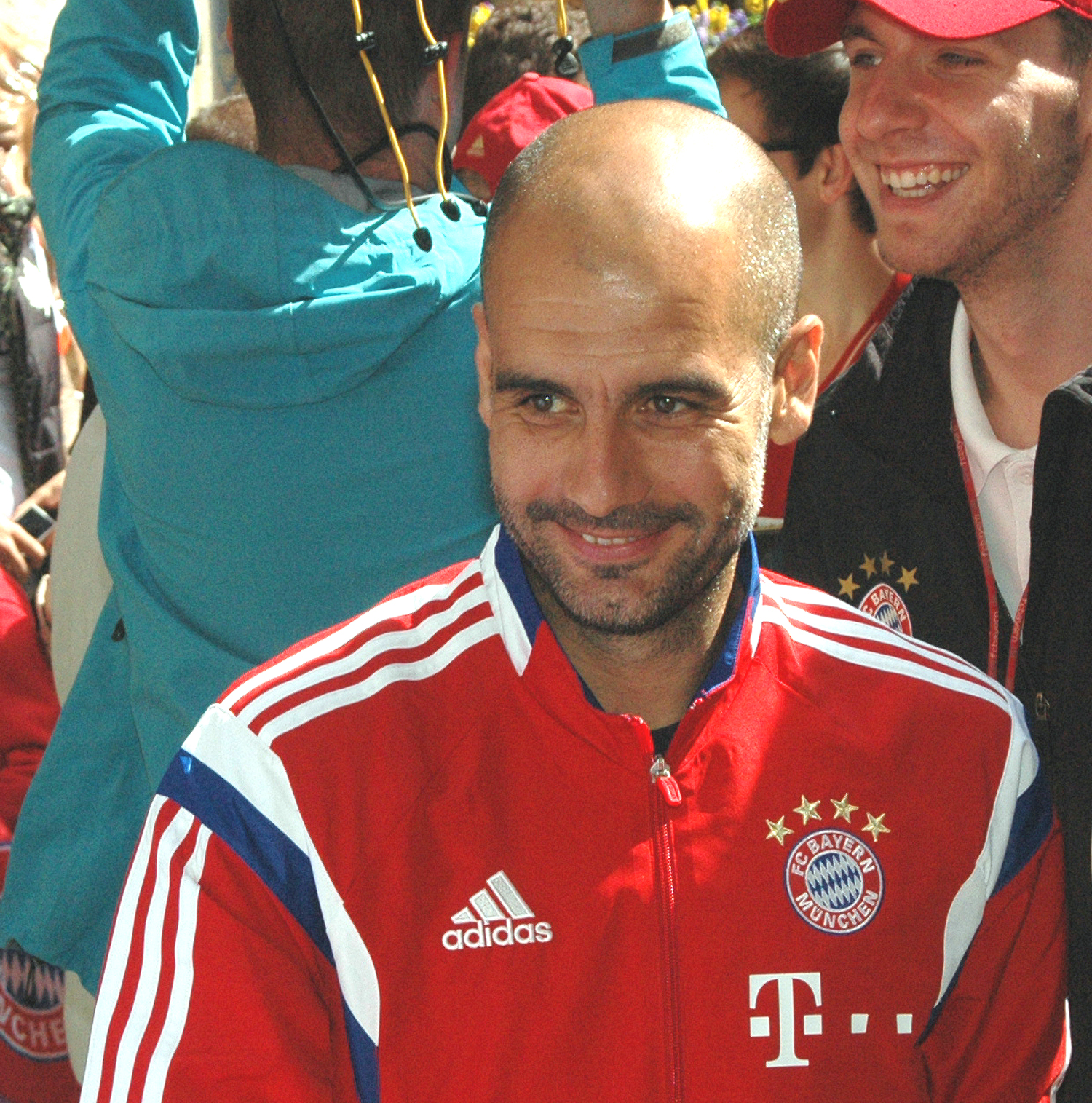 Pep Guardiola bei der Siegesfeier des FC-Bayern im Hof des Münchner Rathauses